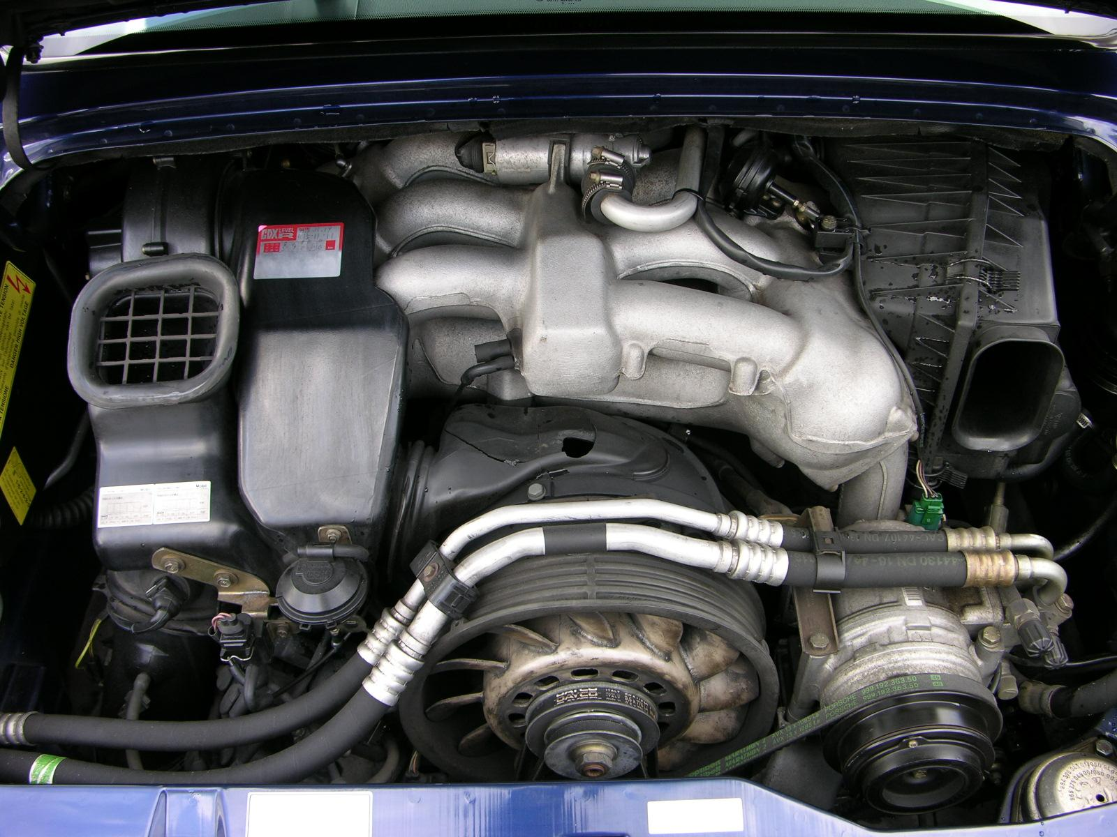 Porsche 911 Carrera 2